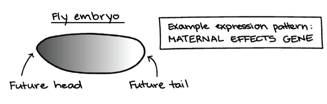 Maternal